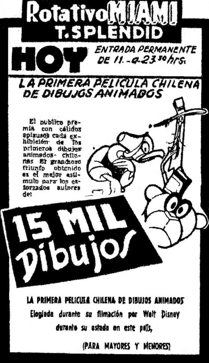 Un afiche de la pelicula 15.000 dibujos , presentada en un cine de la capital de chile